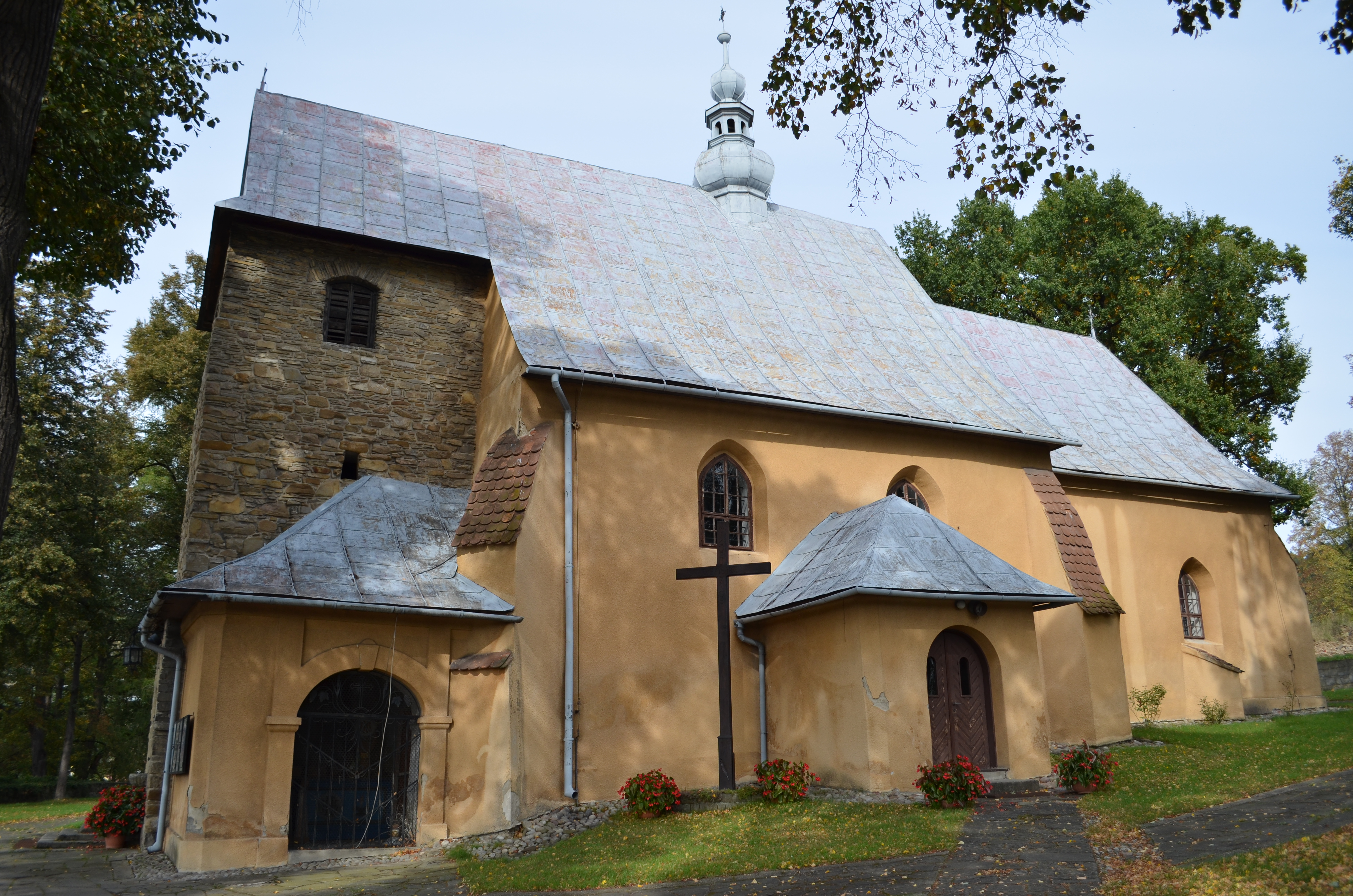 Wielogłowy. Kościół par. p.w. Wniebowzięcia NMP, 1318, XVII.